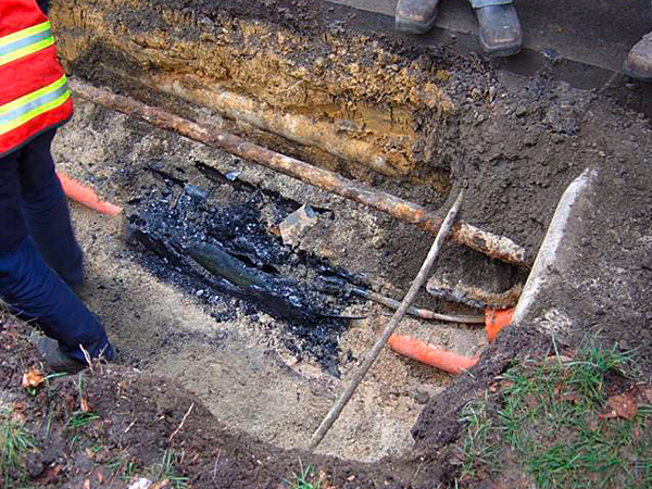 Kabelfehler: freigelegter Lichtbogenschaden an einem Erdkabel (Strom)